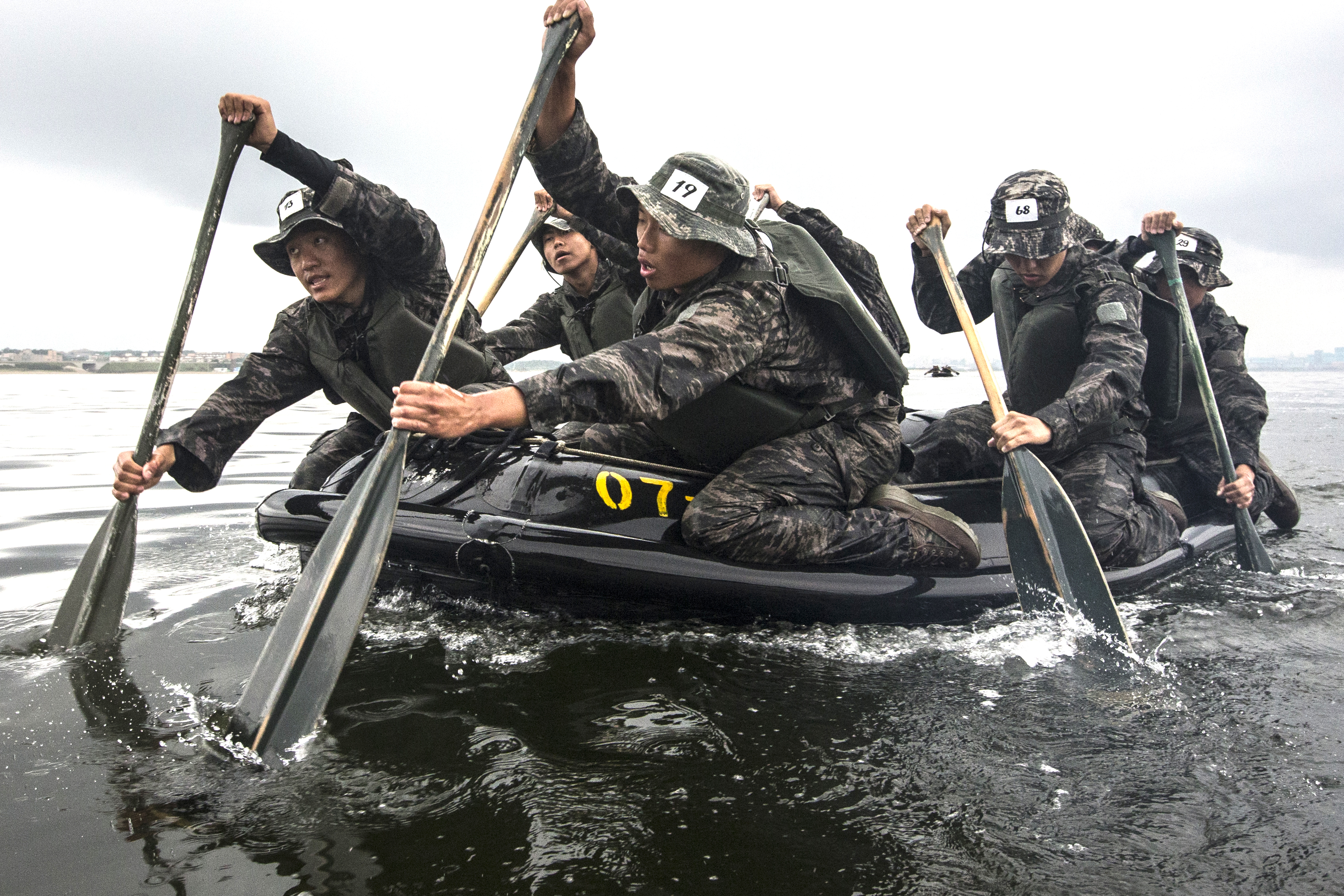 촬영 - 조성수 작가